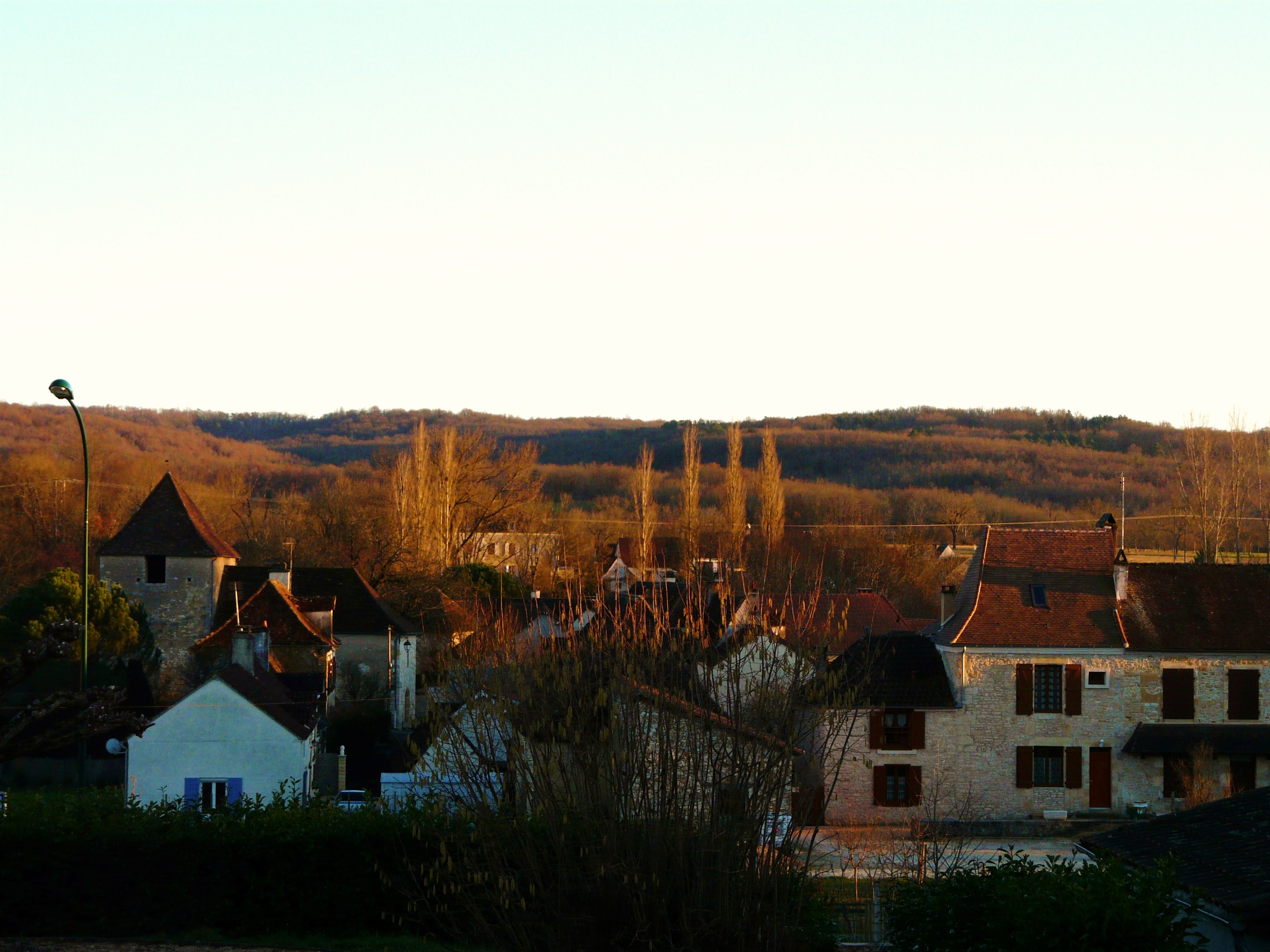 Le village de Saint-Martial-d'Albarède, Dordogne, France.